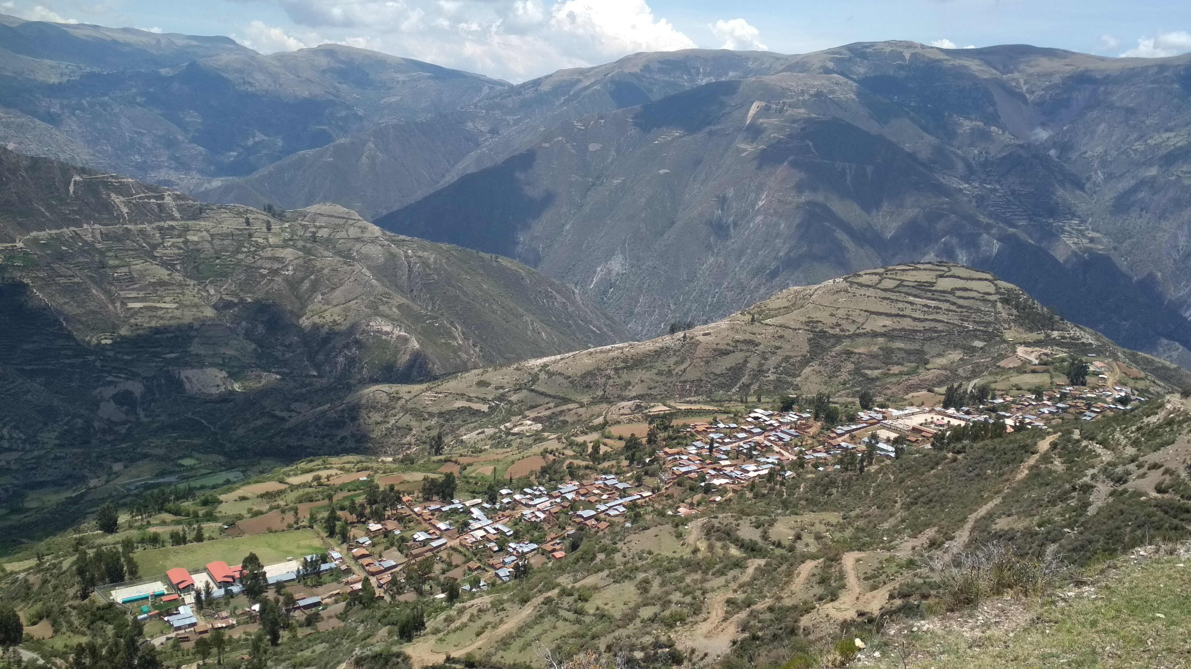 Vista del pueblo de Tiquihua en Ayacucho, Perú